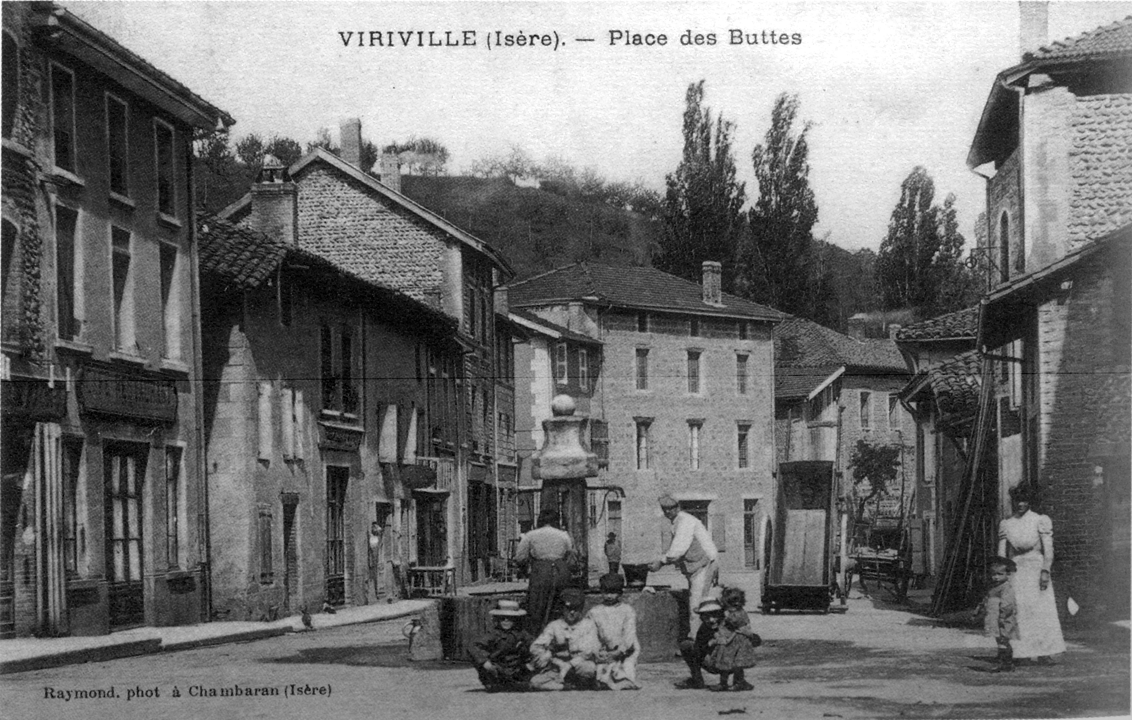 Viriville, place des Buttes, 1912